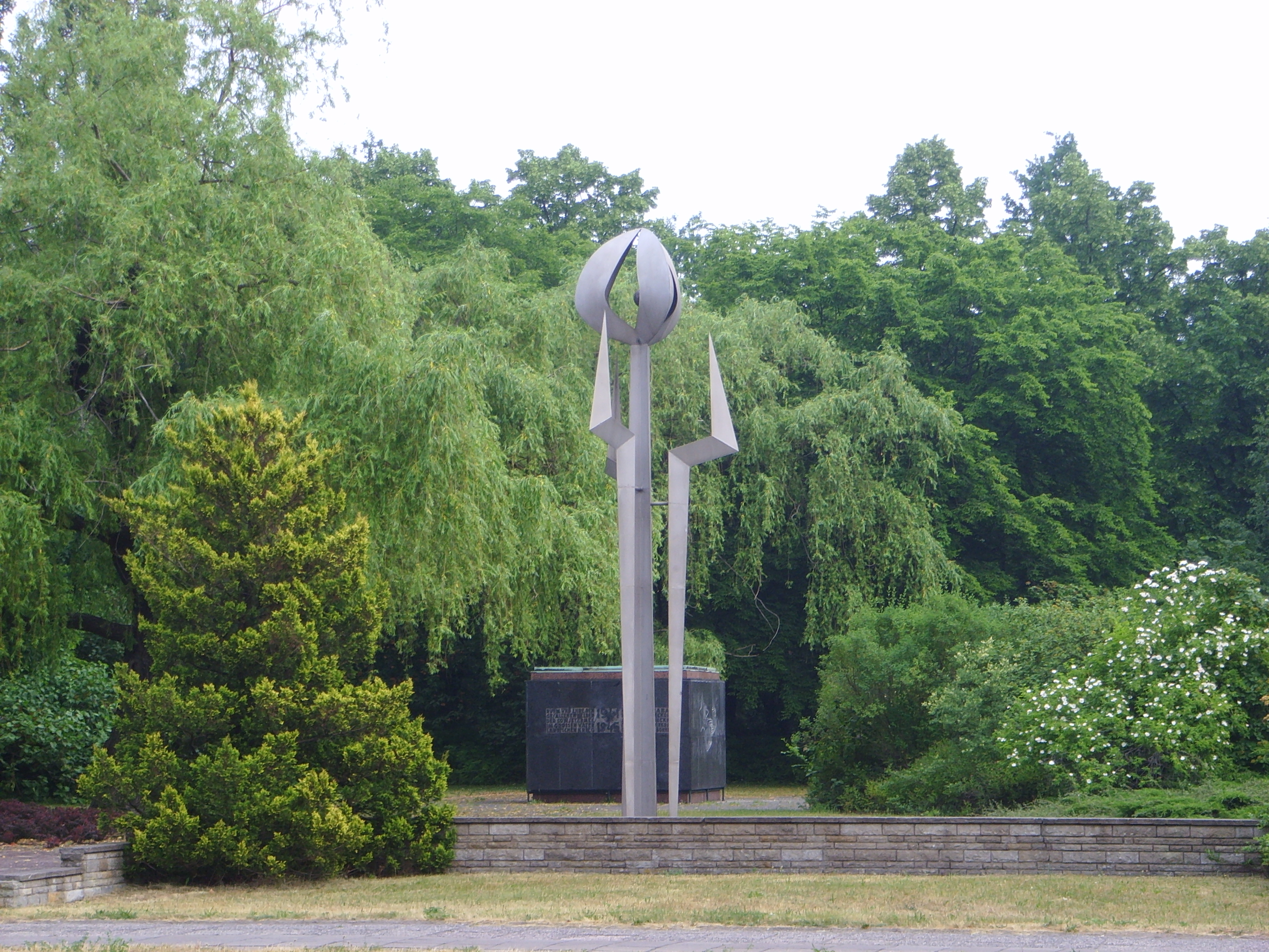 Ehrenmal für die sowjetischen Soldaten, die bei der Befreiung Senftenbergs im Zweiten Weltkrieg gefallen sind